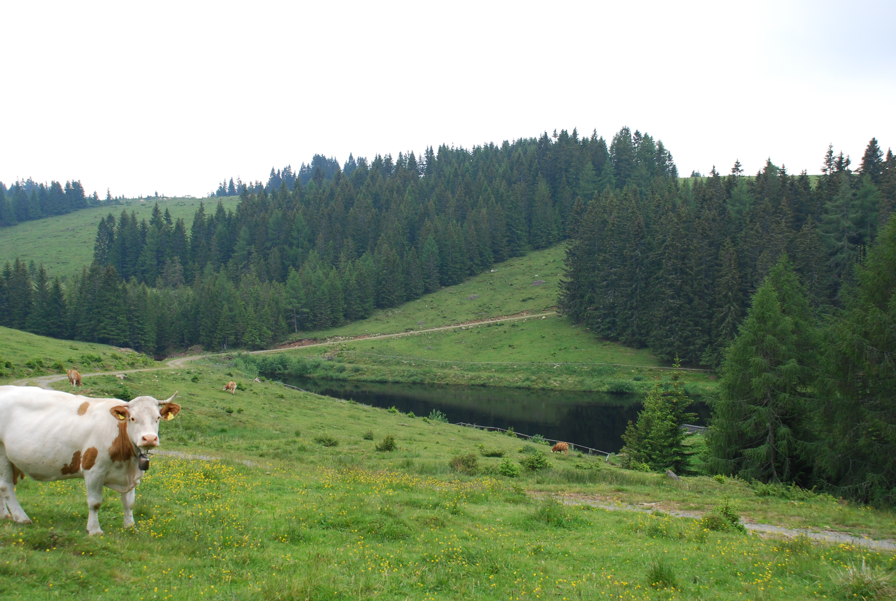 Stausee am Rettenbach für die Energieversorgung der Freiländer Alm